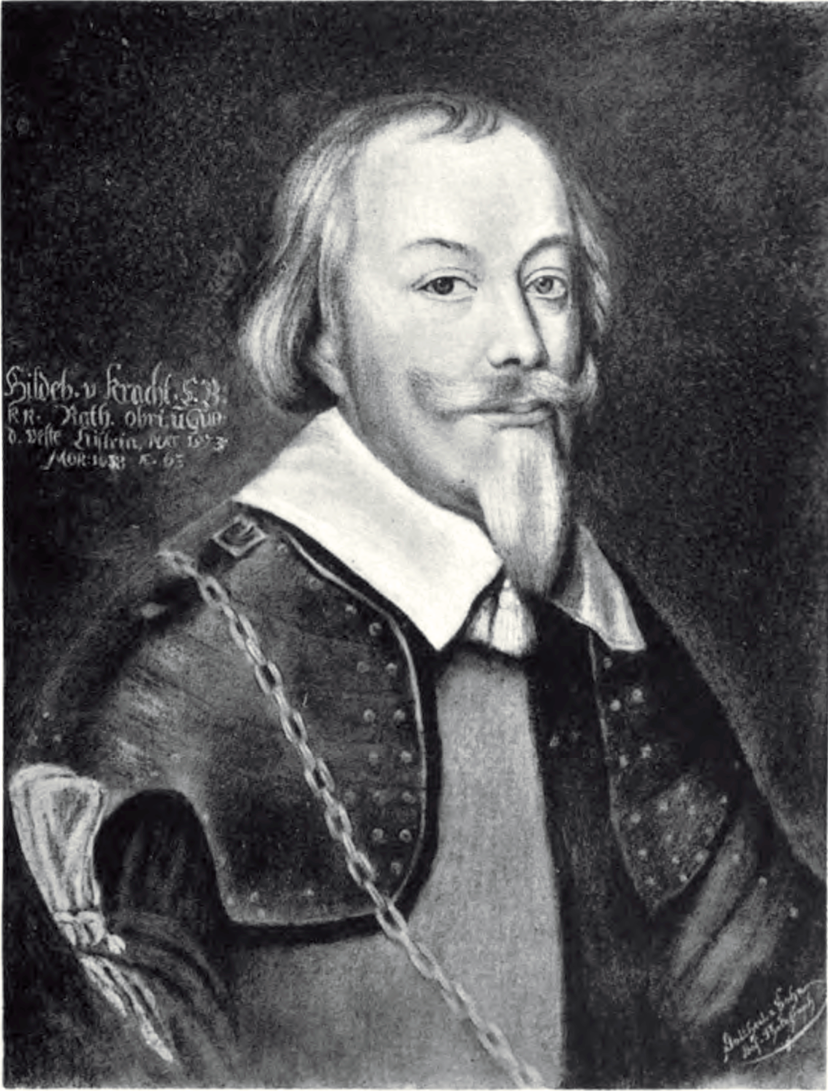 Hildebrand von Kracht (1573 - 1638), brandenburgischer Offizier und Oberhauptmann von Cüstrin